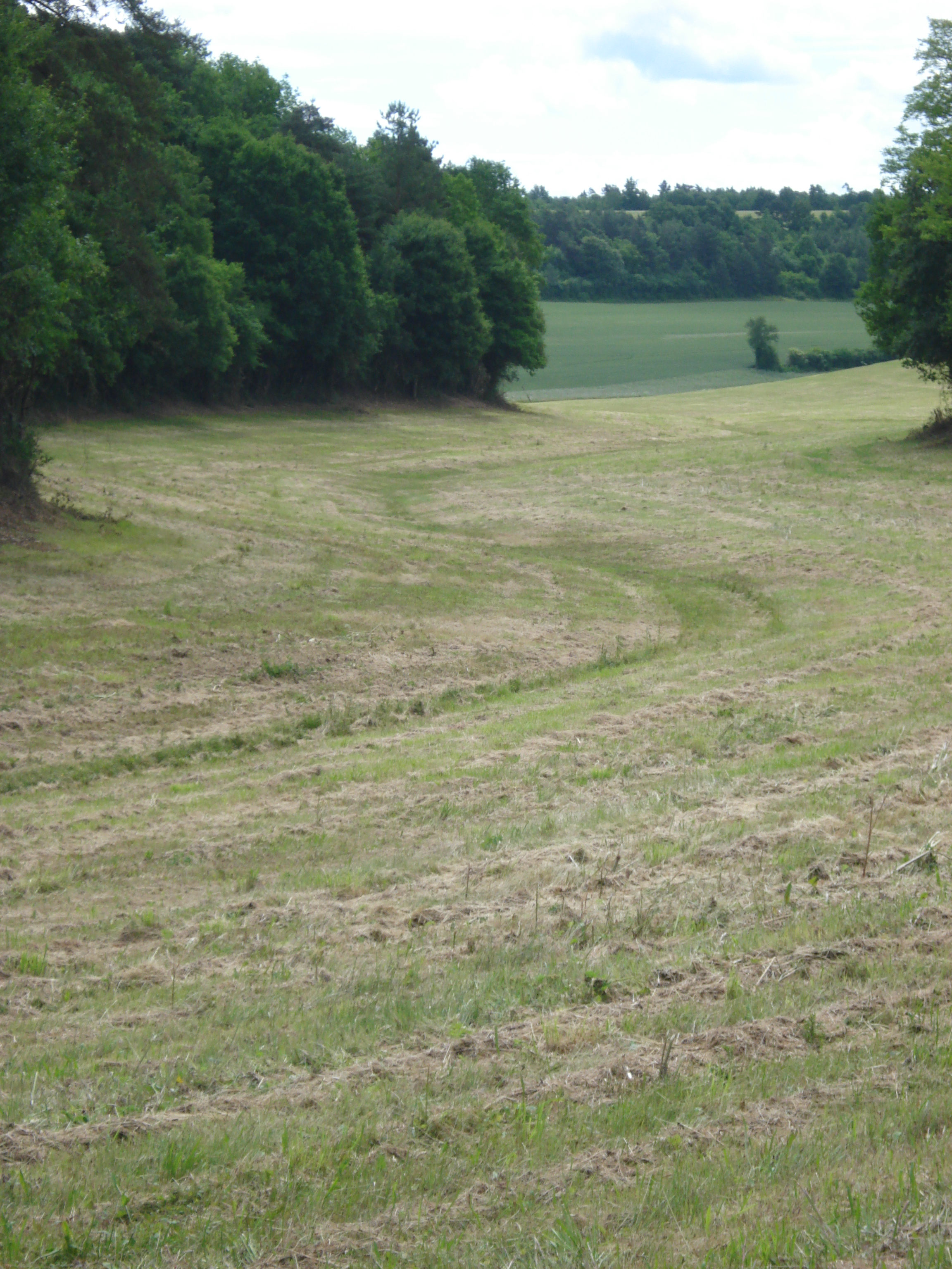 Lit sec du ruisseau l'Ouèvre en amont de Fresnes (Yonne, Fr).